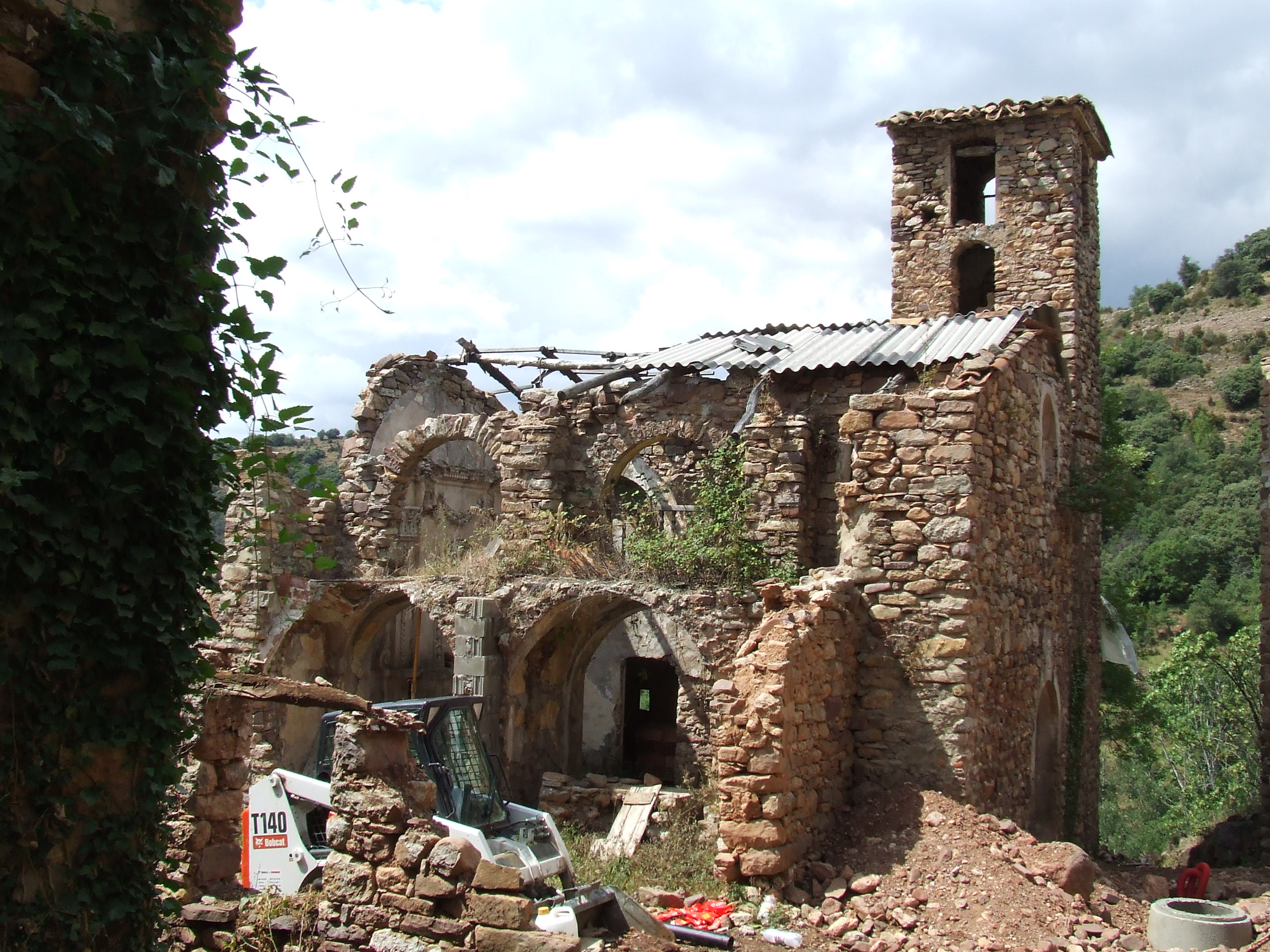 L'església d'Emvall (la Pobleta de Bellveí, la Torre de Cabdella, Pallars Jussà)